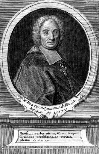 Tableau de Crepy sur Honoré de Quiqueran de Beaujeu, évêque de Castres, propriété de l'état français